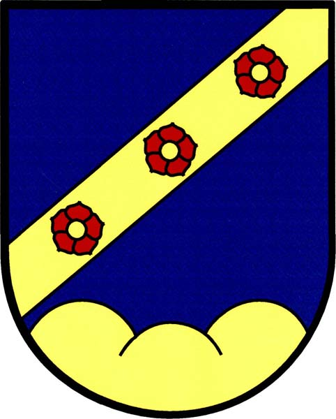 Znak obce Domoraz